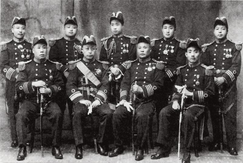 民国初期の海軍軍官。後列左二人目に許鳳藻(1891—1953)